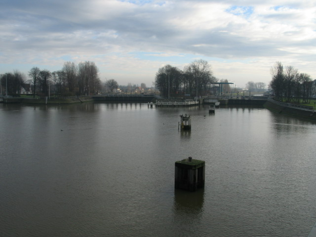 Ganzepoot. Het rechtergedeelte van de Ganzepoot (27 dec 2004)